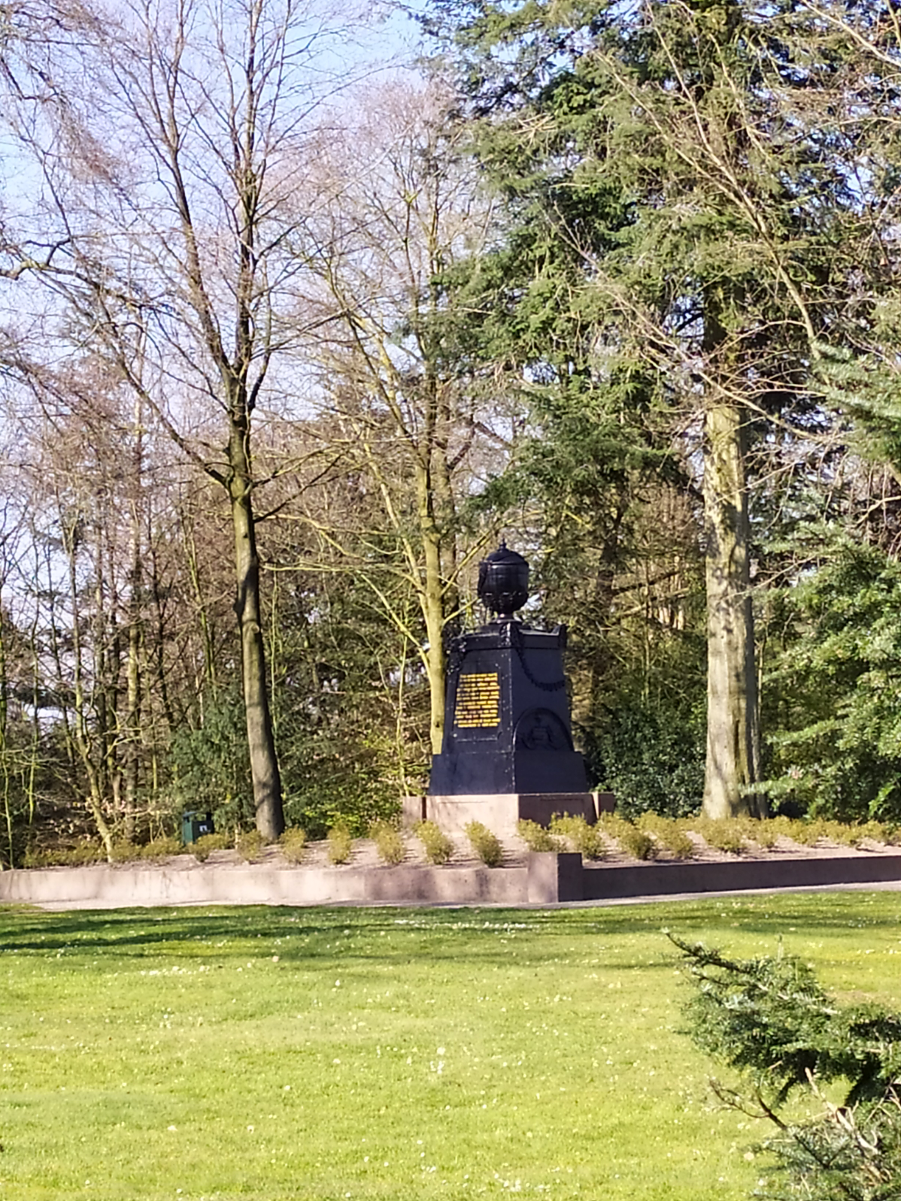 Anna Maria Moens gedenkteken. Sinds 2018 zwart.